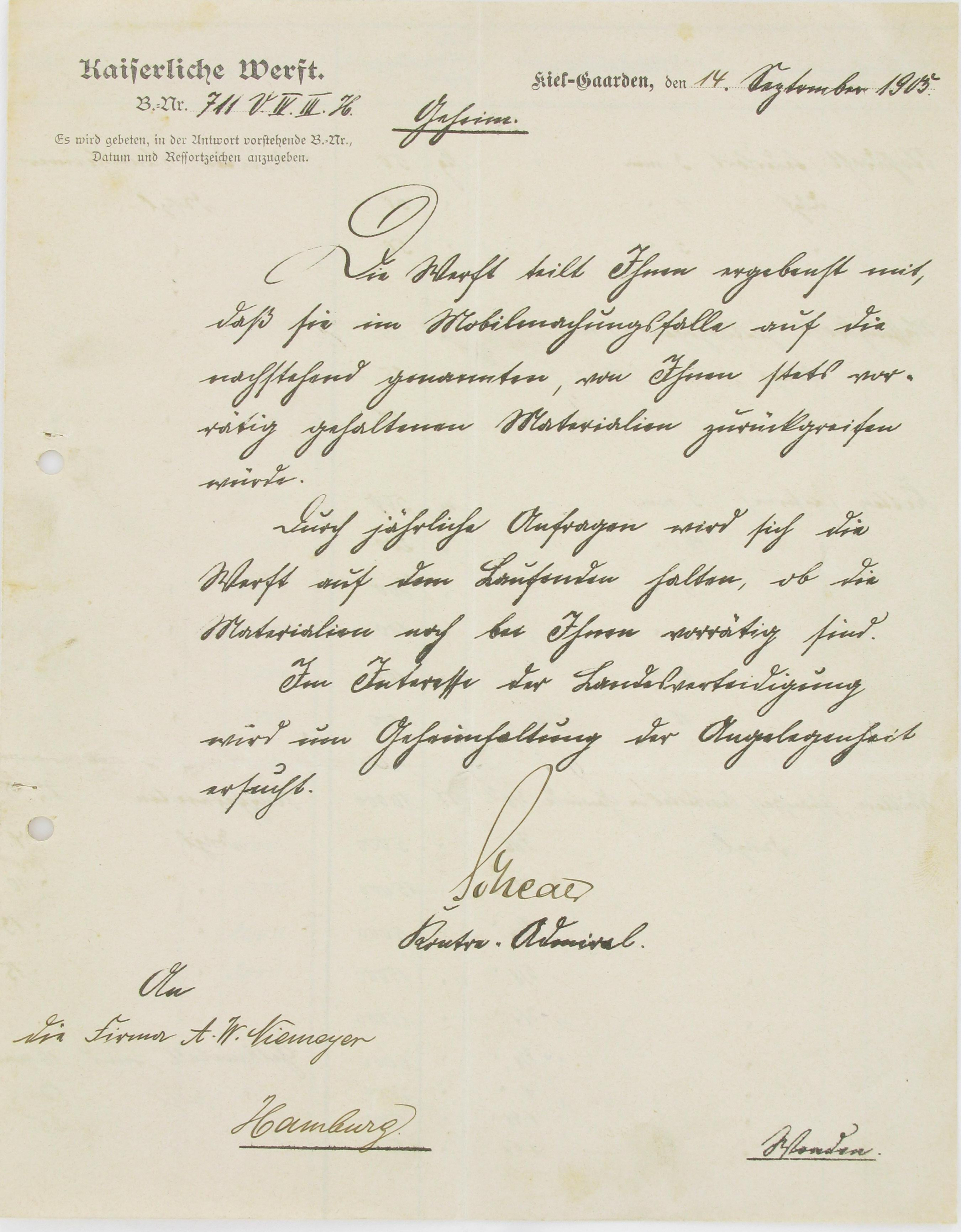 Historisches Dokument